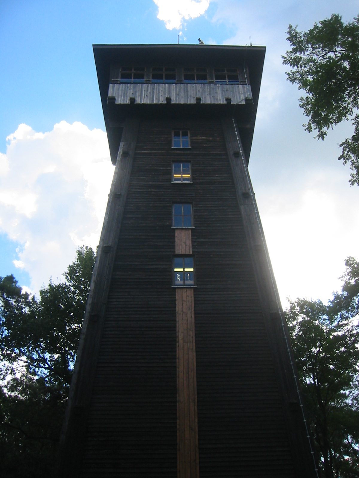 Aussichtsturm auf den Kranichsberg in Woltersdorf bei Berlin